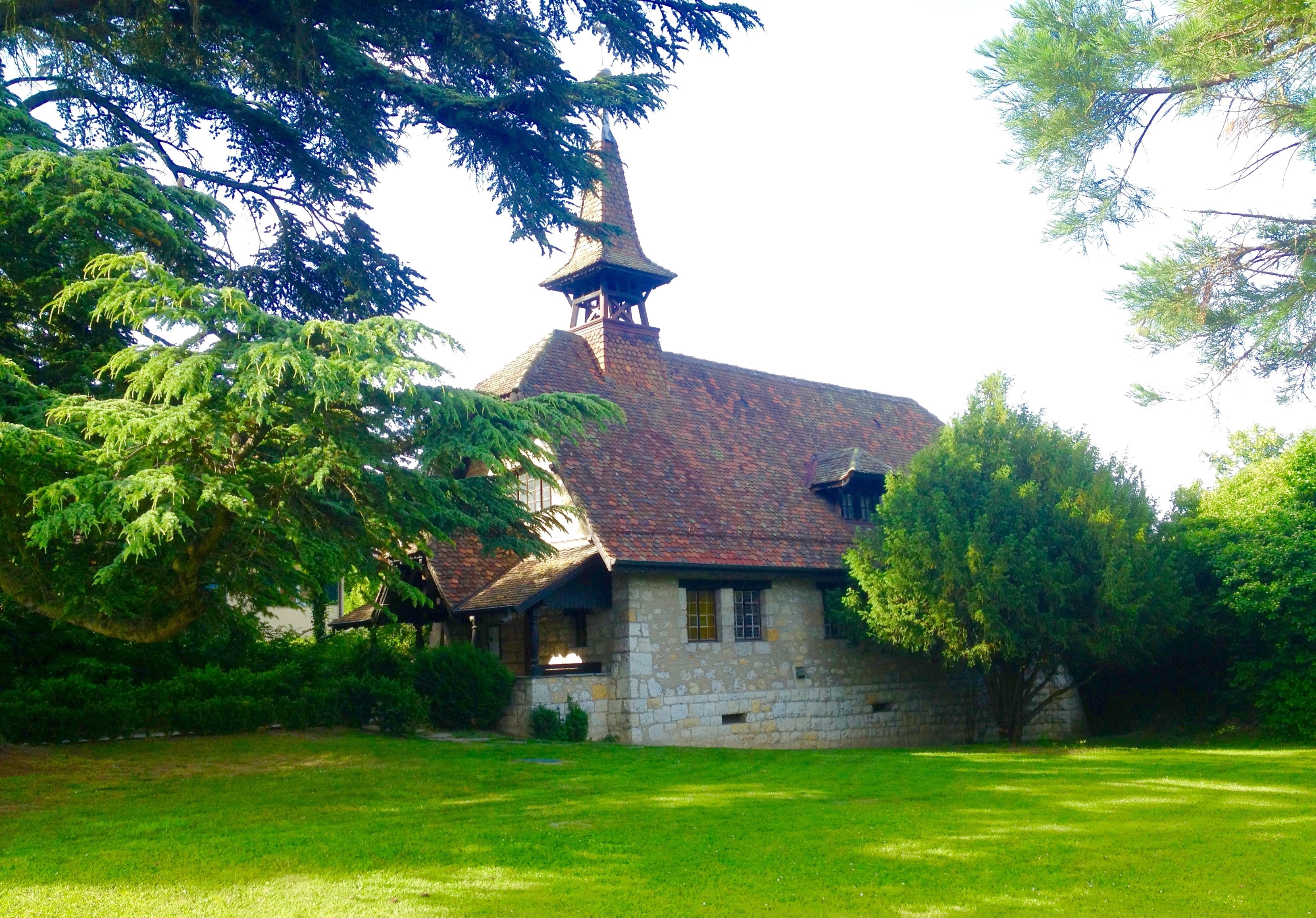 Chapelle Protestante des Cornillons de Pregny-Chambésy, dans la campagne genevoise.